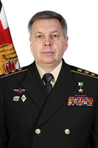 Костюков Игорь Олегович Начальник Главного управления Генерального штаба Вооружённых Сил Российской Федерации – заместитель начальника Генерального штаба Вооружённых Сил Российской Федерации, адмирал